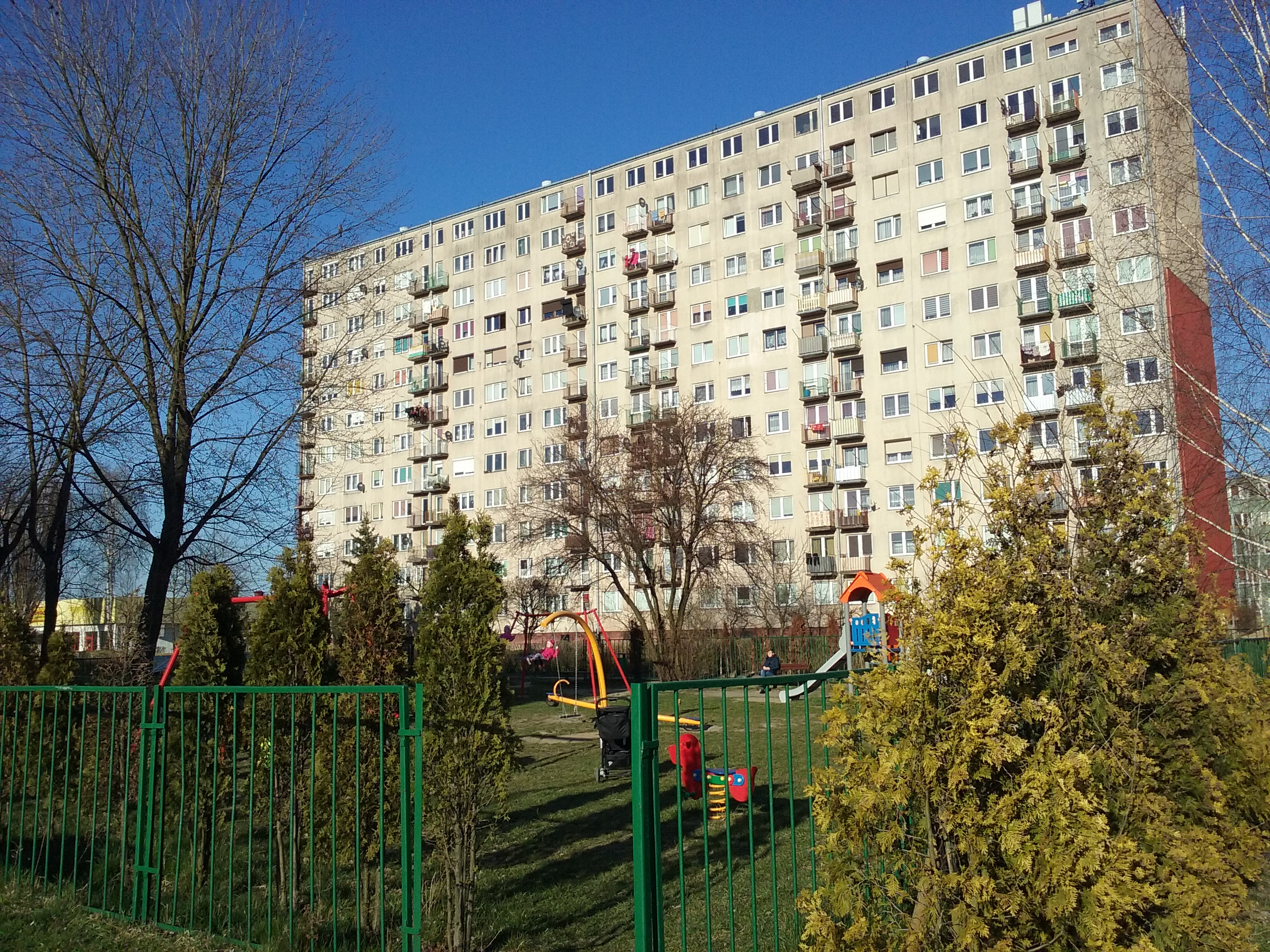 Tomaszów Mazowiecki w wojewóðztwie łódzkim PL,EU. Jeden z wieżowców na największym osiedlu w mieśćie - Niebrowie